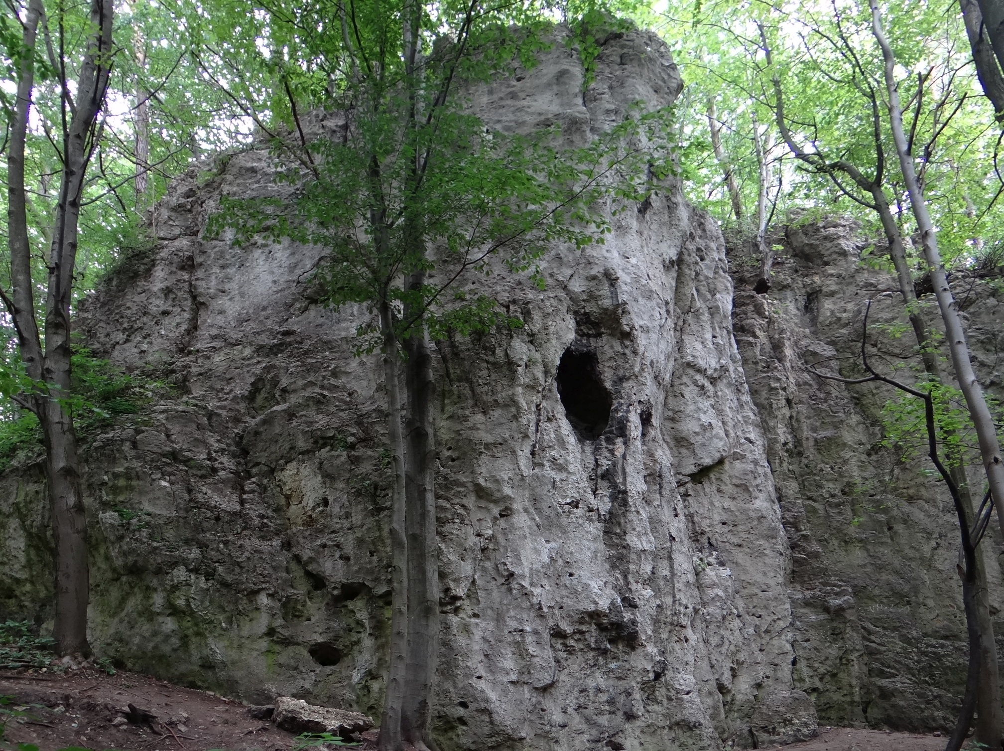 Skała Organy w Wąwozie Ostryszni w Imbramowicach